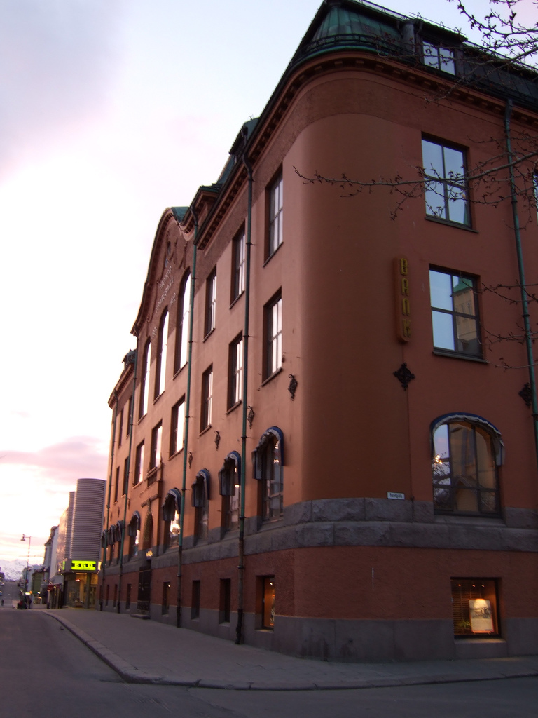 Rødbanken, bank building in Art Nouveau style in Tromsø, Norway